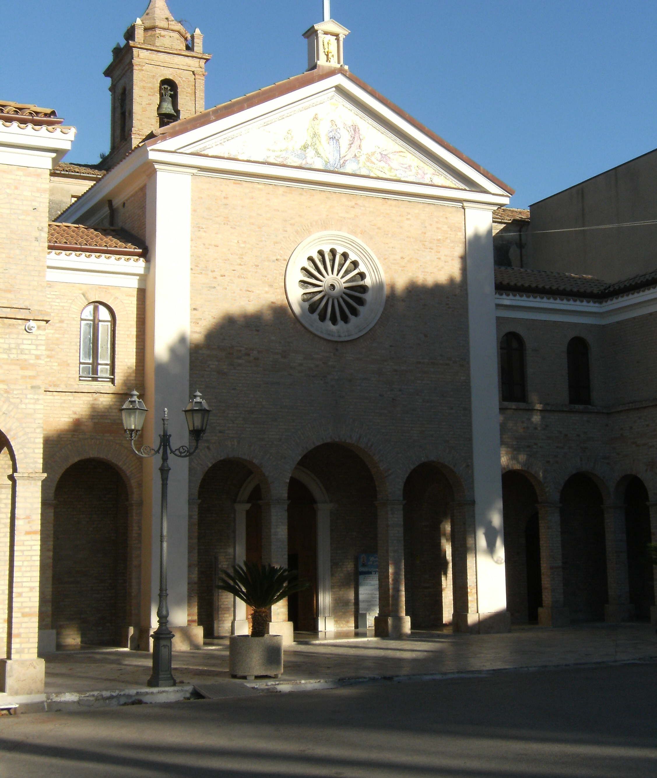 Santuario di Maria Santissima dello Splendore di Giulianova